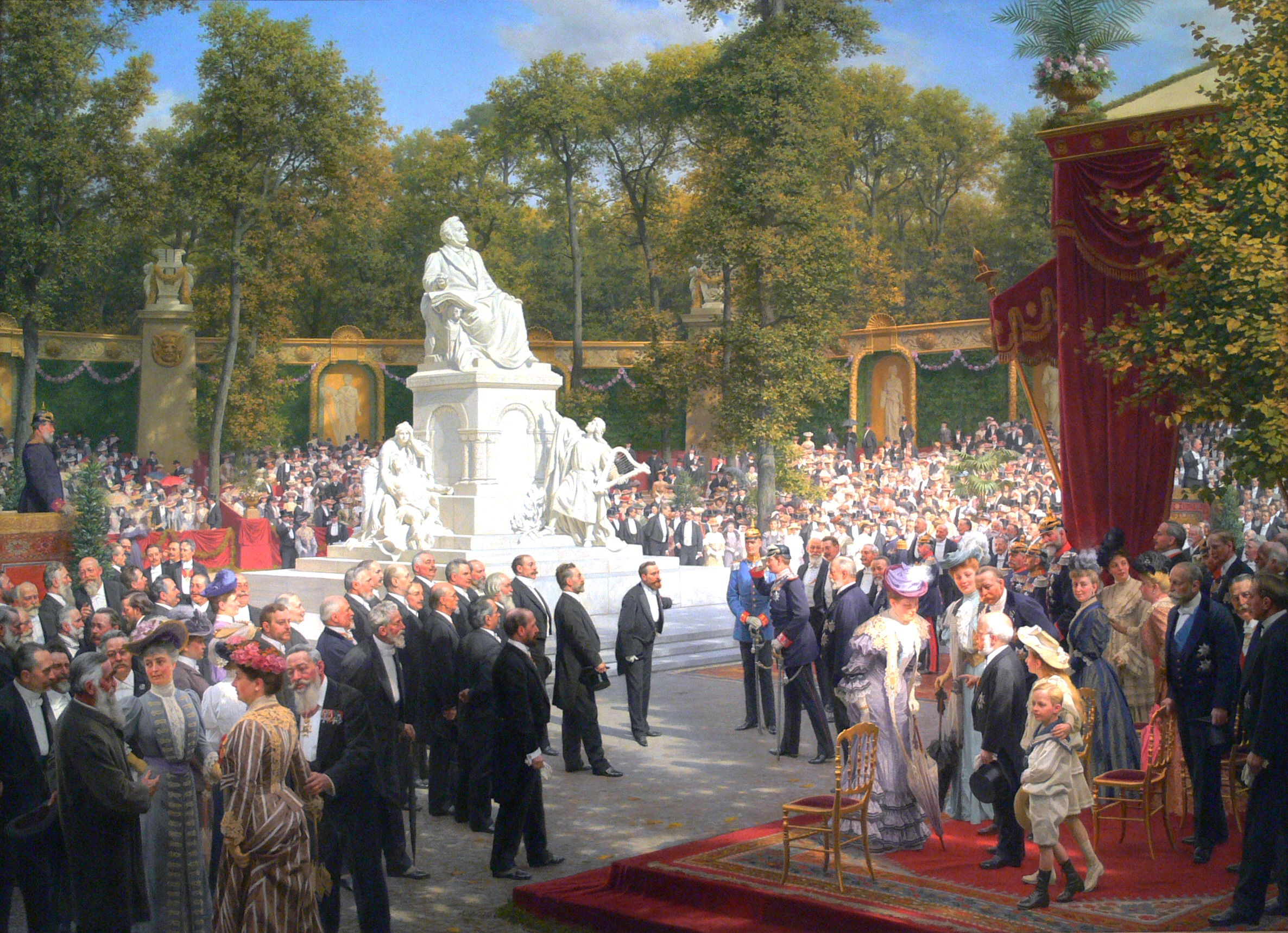 Anton von Werner: Enthüllung des Richard-Wagner-Denkmals im Tiergarten, Öl auf Leinwand, 1908 Berlinische Galerie Native nameBerlinische GalerieLocationBerlinCoordinates52° 30′ 15″ N, 13° 23′ 56″ E Established1975, 2004 (moved to present quarters)Website control VIAF: 129006962 SUDOC: 029122295 BNF: 12081430c